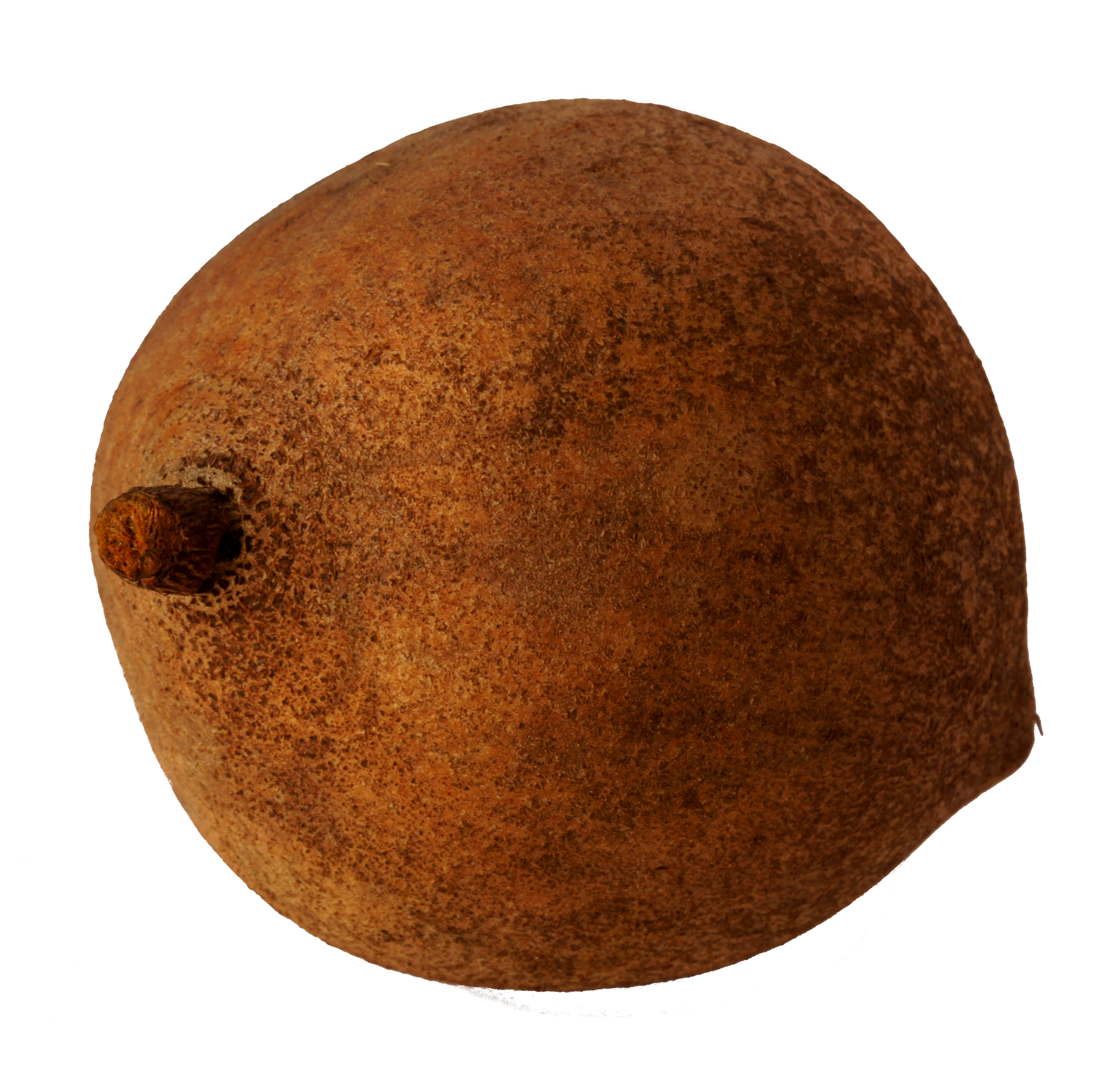 Mammea americana